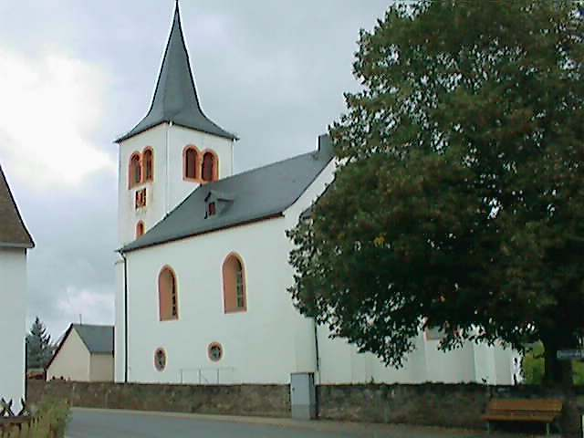 Die evangelische Kirche in Dörscheid